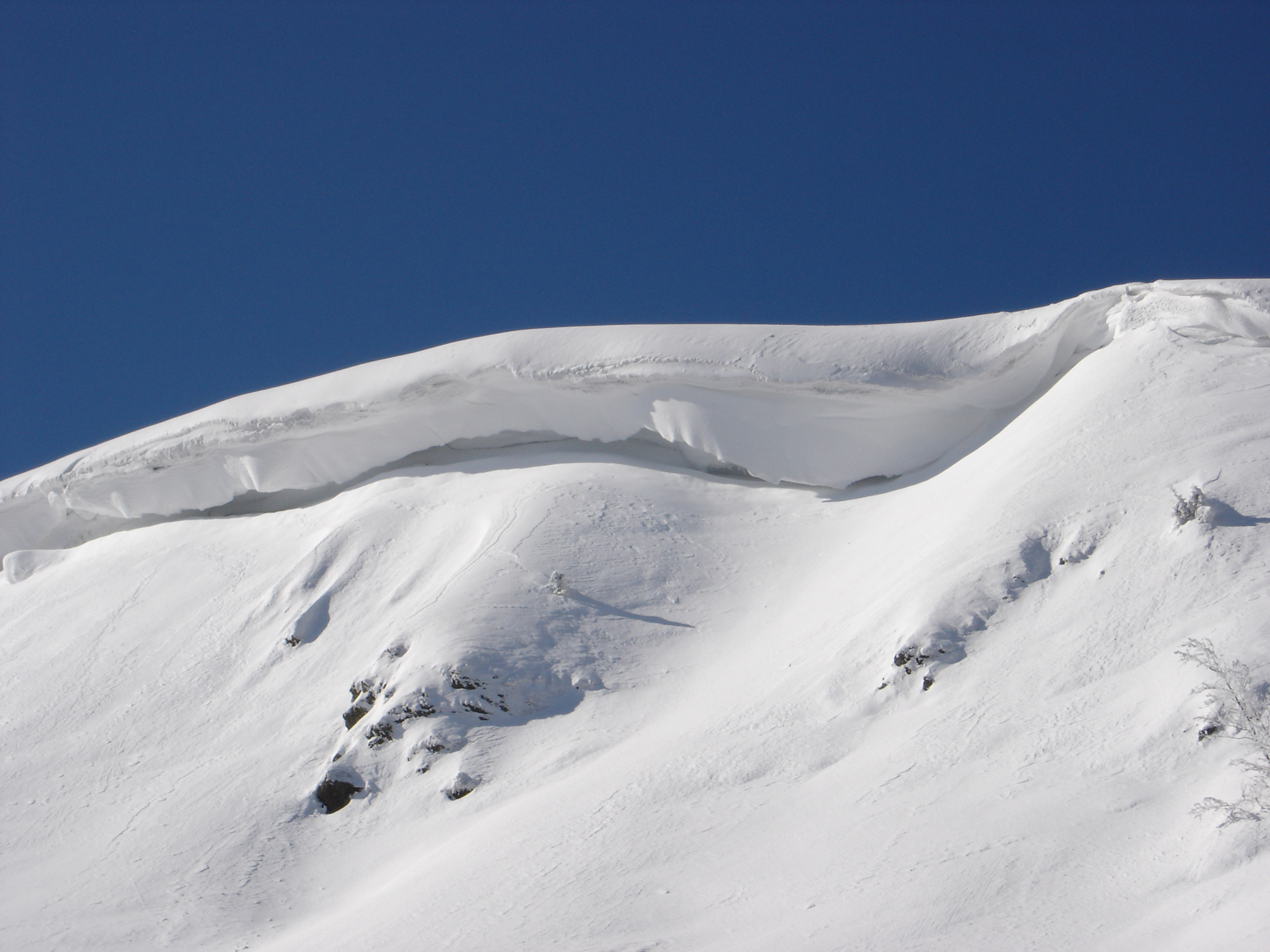 Herzogenhornwächte (Schwarzwald)